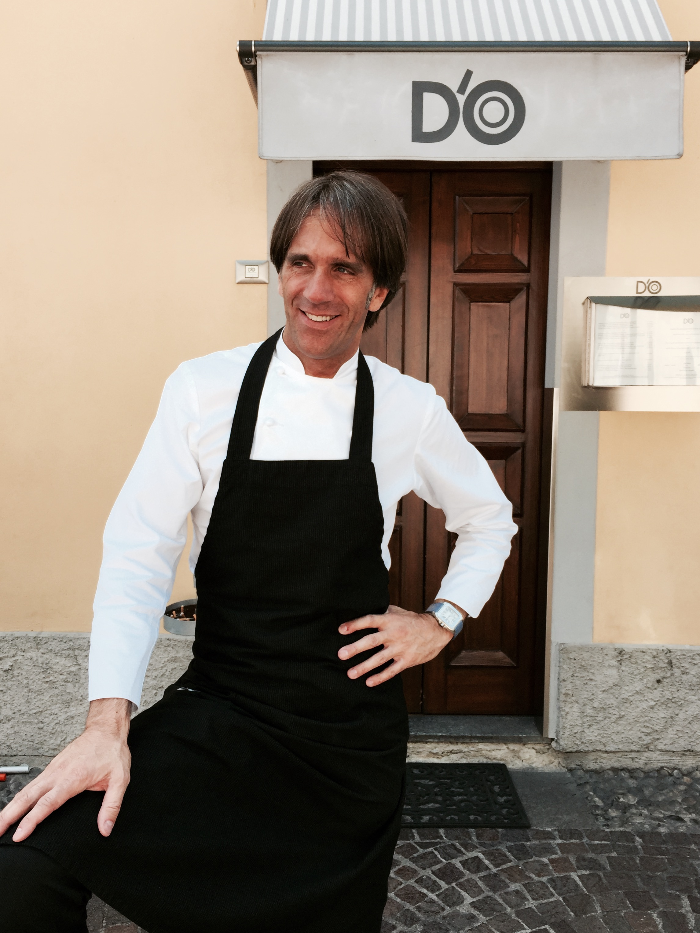 Davide Oldani di fronte al suo ristorante, il D'O